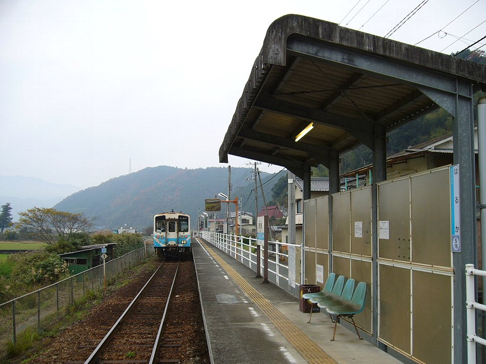 予讃線（旧線）春賀駅